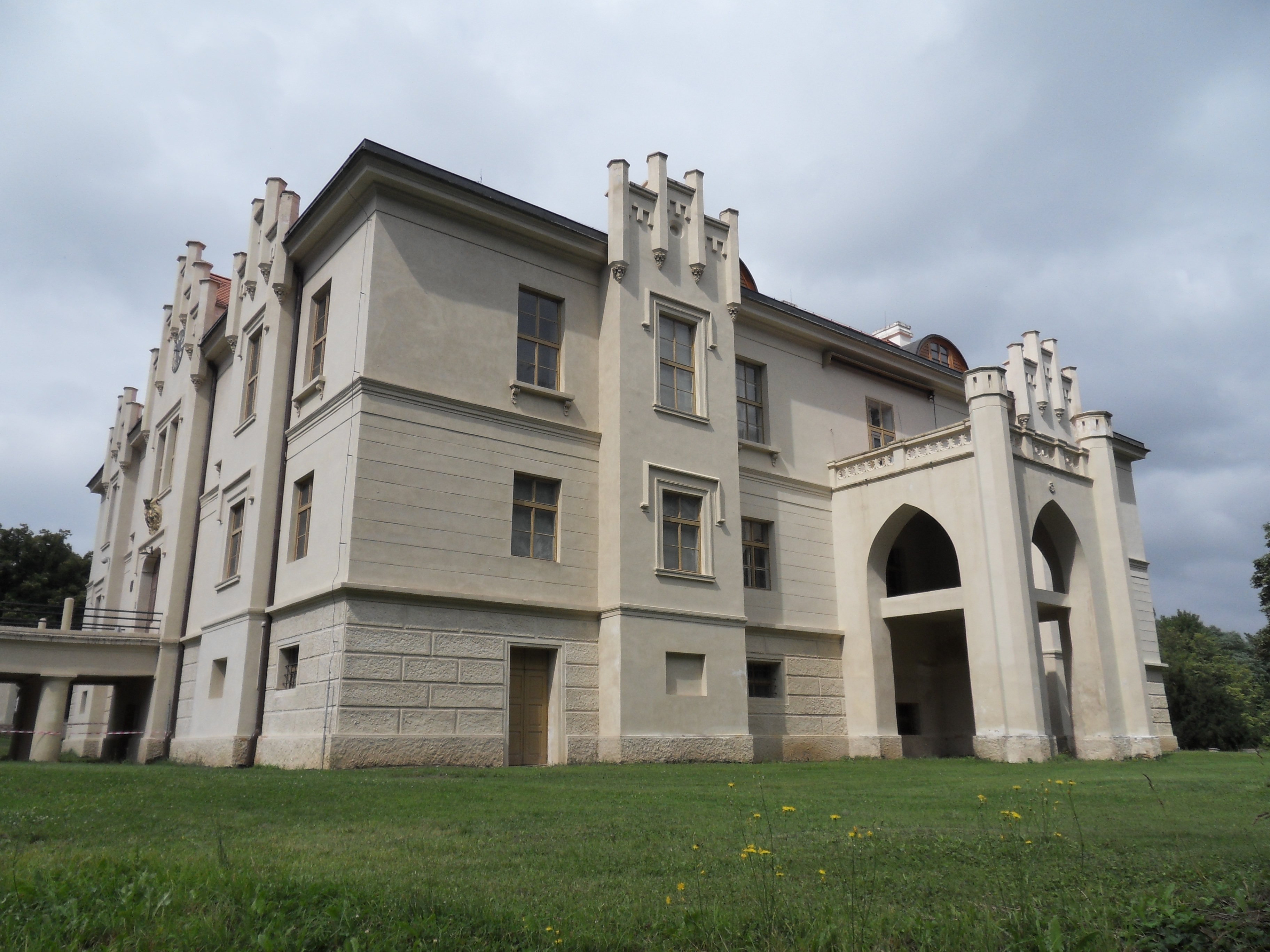 Pohled na zámek Hradiště od východu, Hradiště 1, Hradiště (Blovice).